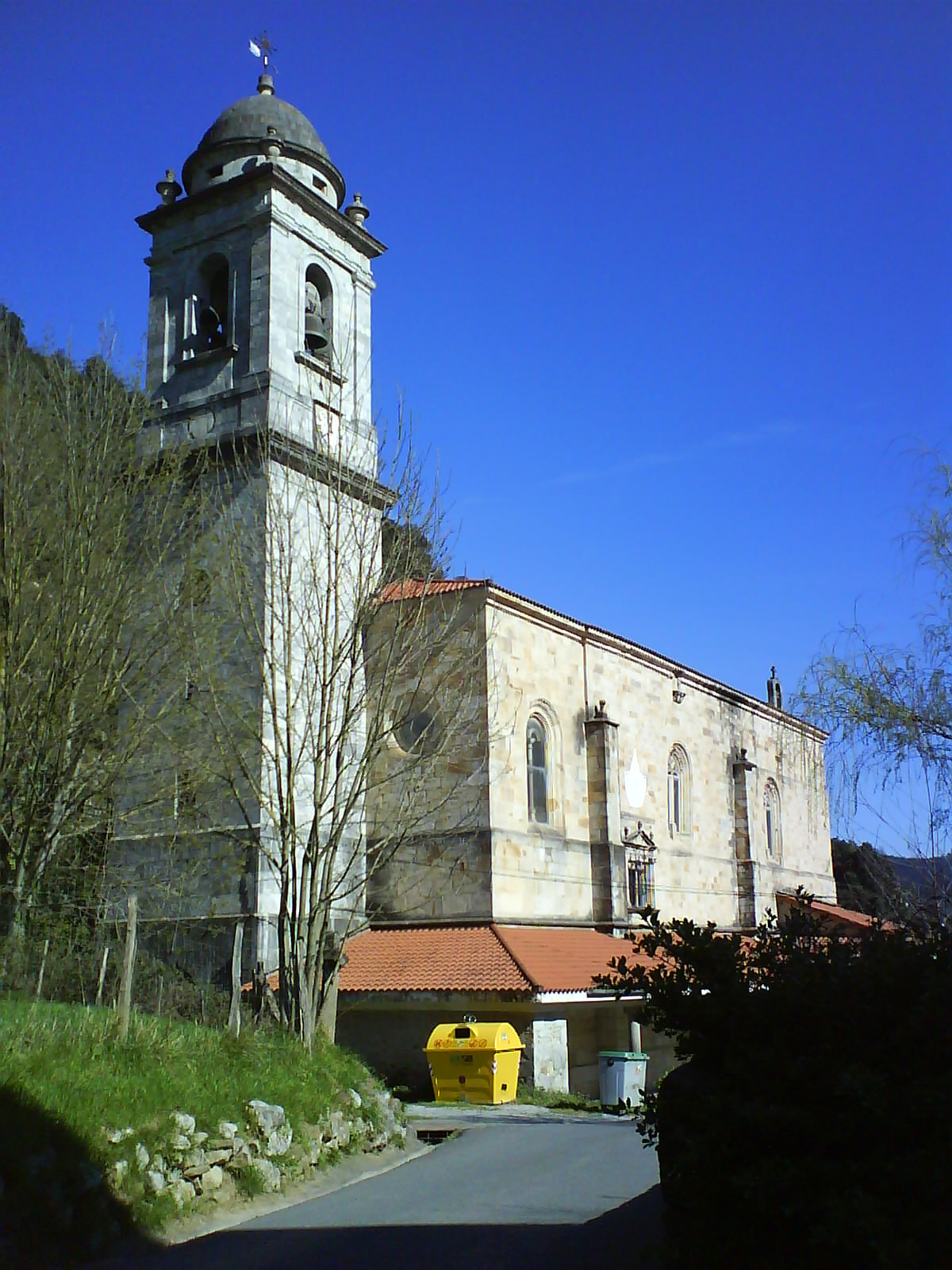 Iglesia de santa María de Mañaria, Vizcaya, País Vasco, España